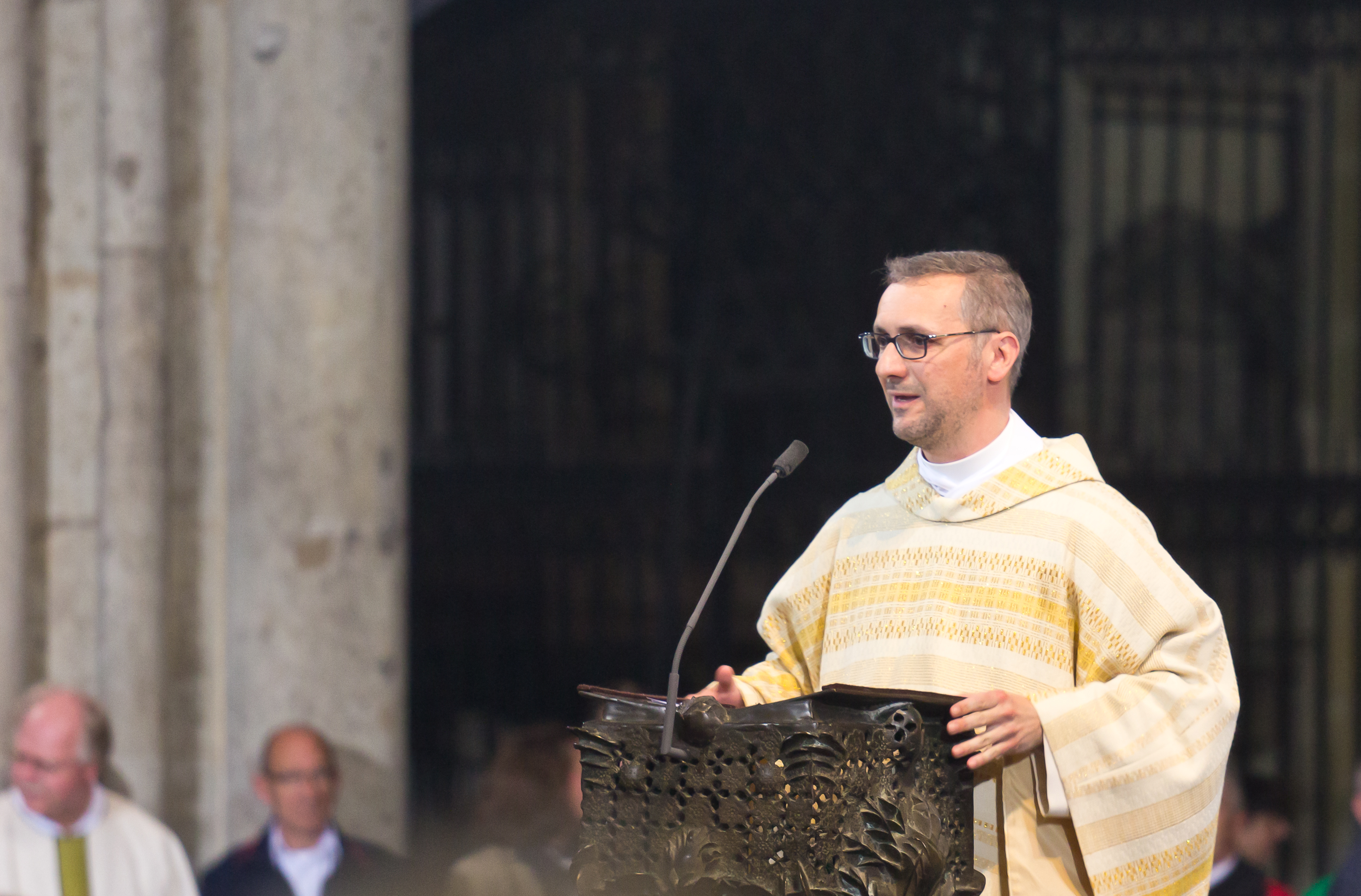 Feier zur Amtseinführung des Erzbischofs von Köln Rainer Maria Kardinal Woelki im Hohen Dom zu Köln Foto: Diözesanadministrator Stefan Heße begrüßt die Gemeinde zu Beginn des Pontifikalamtes